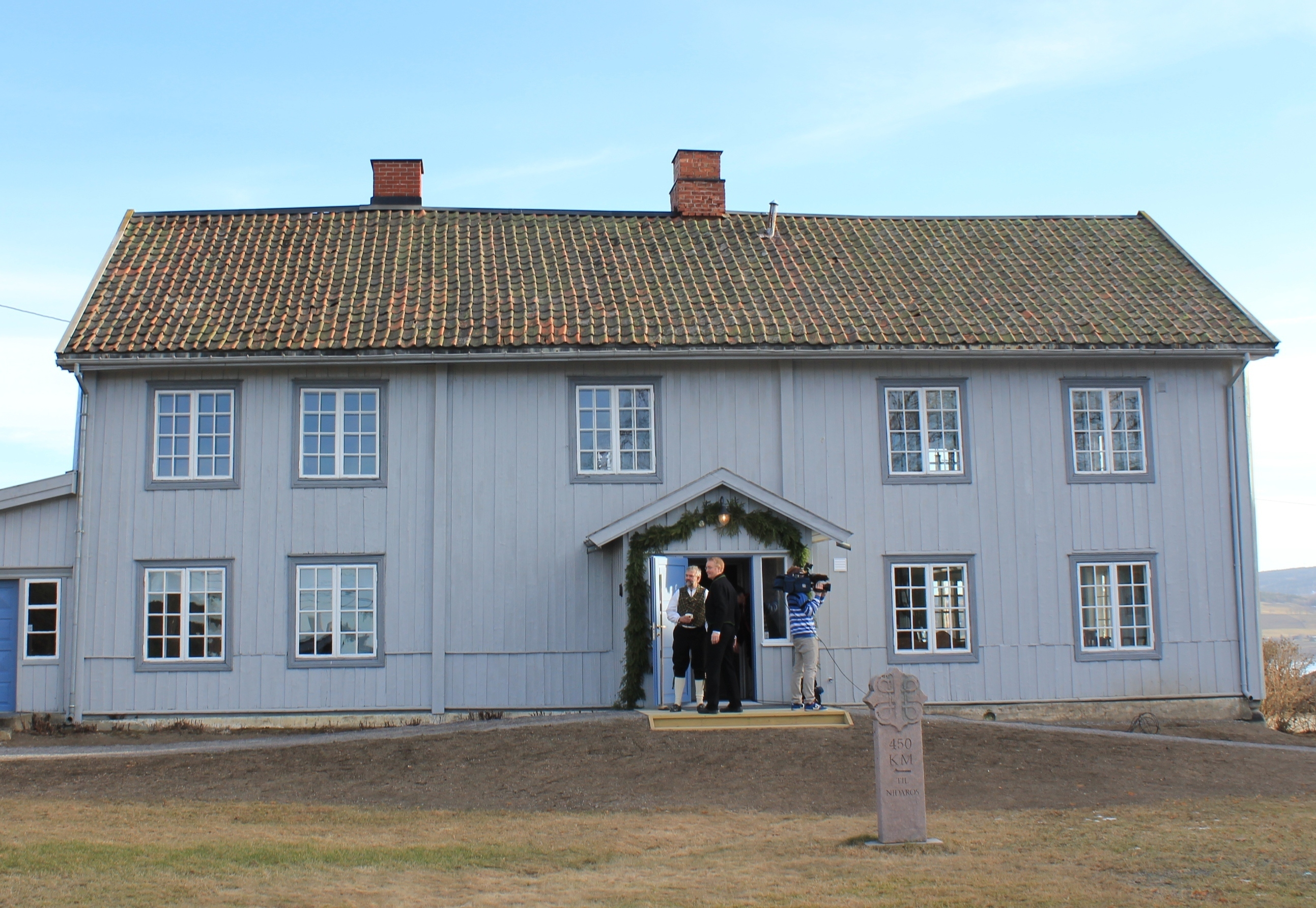 Det kan være at den gamle tingbygningen på Hunn er byens eldste bygning. I Blåsalen i andre etasje samlet 37 valgmenn seg fra hele Kristians amt 14. mars 1814 for å velge amtets valgmenn til riksforsamlingen på Eidsvoll. Dette etter befaling fra prins Christian Frederik til alle Norges amtsmenn om å velge tre representanter fra hvert amt. Ole Hannibal Sommerfelt var amtsmann da møtet på Hunn fant sted. De valgte var var sorenskriver Lauritz Weidemann (1775-1856) fra Toten, proprietær Anders Lysgaard (1756-1857) fra Biri og sogneprest Hans Jacob Stabel (1769-1836) fra Sør-Aurdal. Jens Jensen Hund var vert på Hunn i 1814 da valgmannsmøtet fant sted. Les artikkel og se video hos NRK her